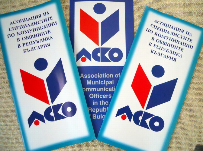 Асоциация на специалистите по комуникации в общините